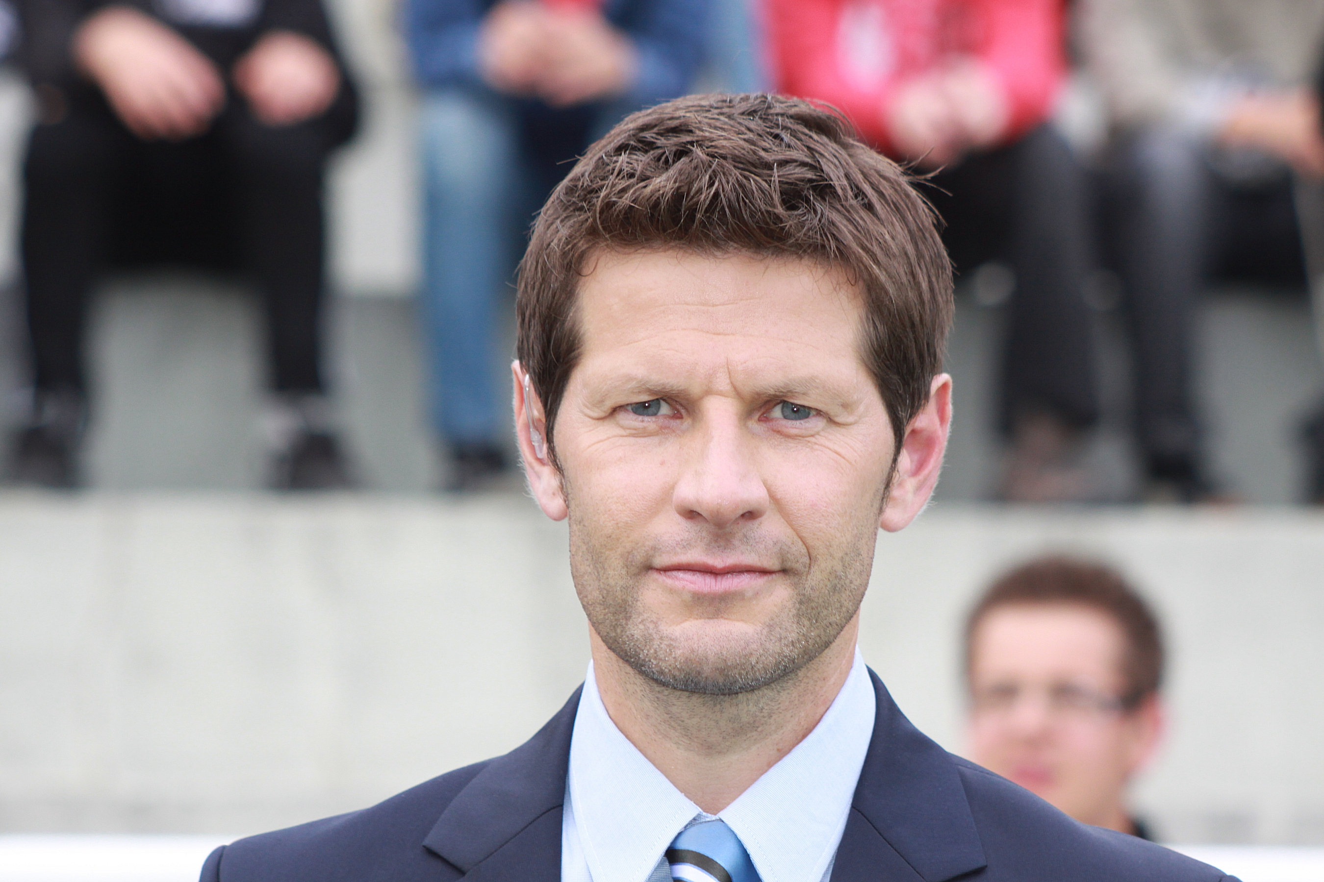 Andreas Heraf - ehemaliger Fußballspieler, nunmehr Teamchef der österreichischen U20-Nationalmannschaft und Verantwortlicher im Österreichischer Fußball-Bund für Nachwuchsförderung sowie Kommentator beim TV-Sender Premiere